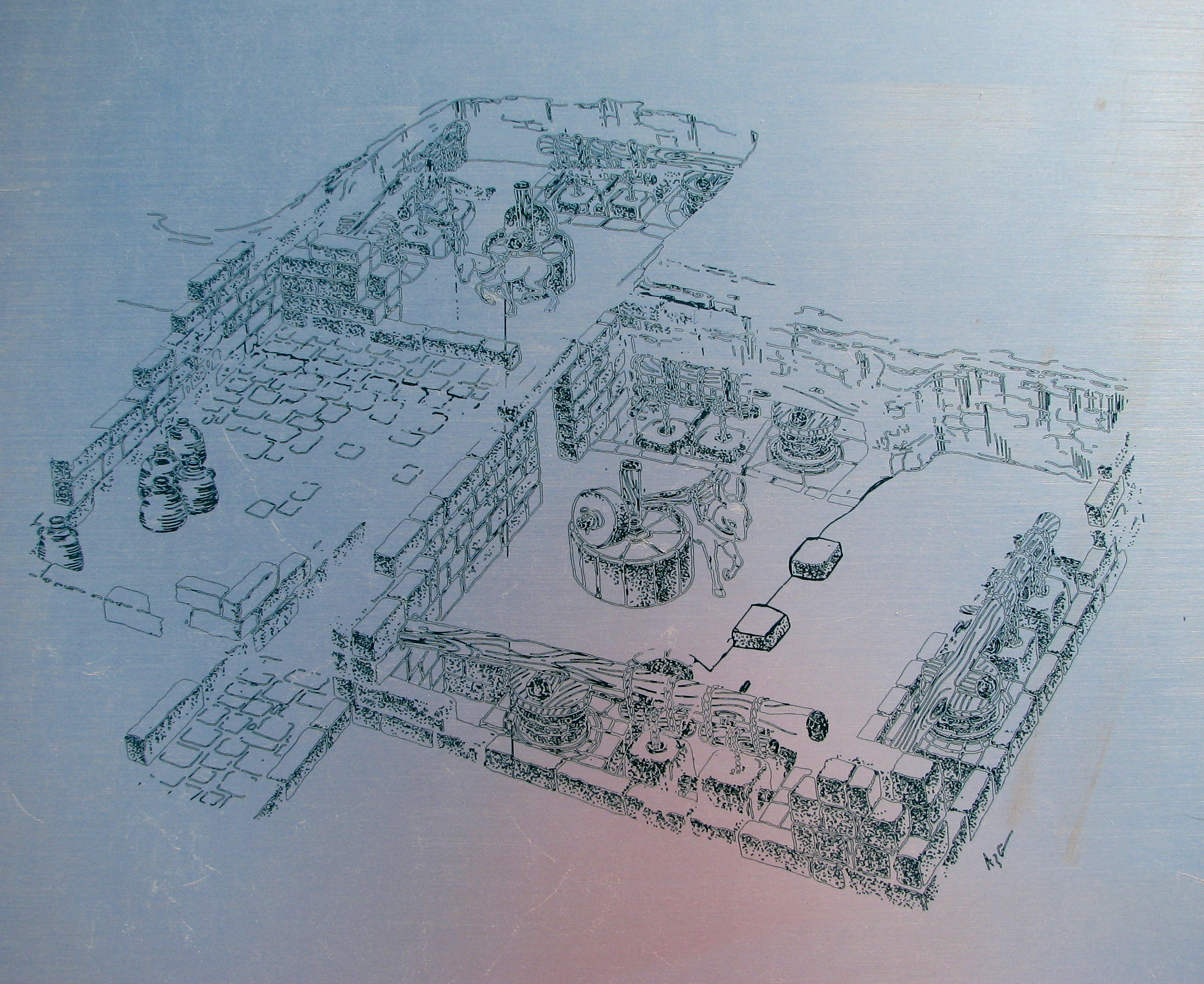 Hurbat Castra – Oil Presses. Byzantine Period 4th-7th Centuries. Located at Haifa בית בד מחורבת קסטרא, התקופה הביזנטית מאות 4-7 לספירה. החורבה נחפרה במבואותיה הדרומיים של חיפה, על התוואי המתוכנן של מנהרת הכרמל. באתר התגלתה עיר רומית ביזנטית שכלכלתה התבססה על ייצור יין ושמן זית בכמויות תעשייתיות. בשנת 1997 הועברו שניים בתי בד לאתר דרך הדורות שבפארק הכרמל. תכנית בתי הבד שקסטרא. צילום השלט ליד בתי הבד